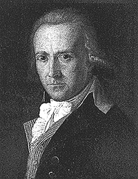 Friedrich von Matthisson, deutscher Dichter, zeitgen. Darstellung des 1831 Verstorbenen, Lizenz: gemeinfrei, durch Ablauf der urheberrechtlichen Fristen